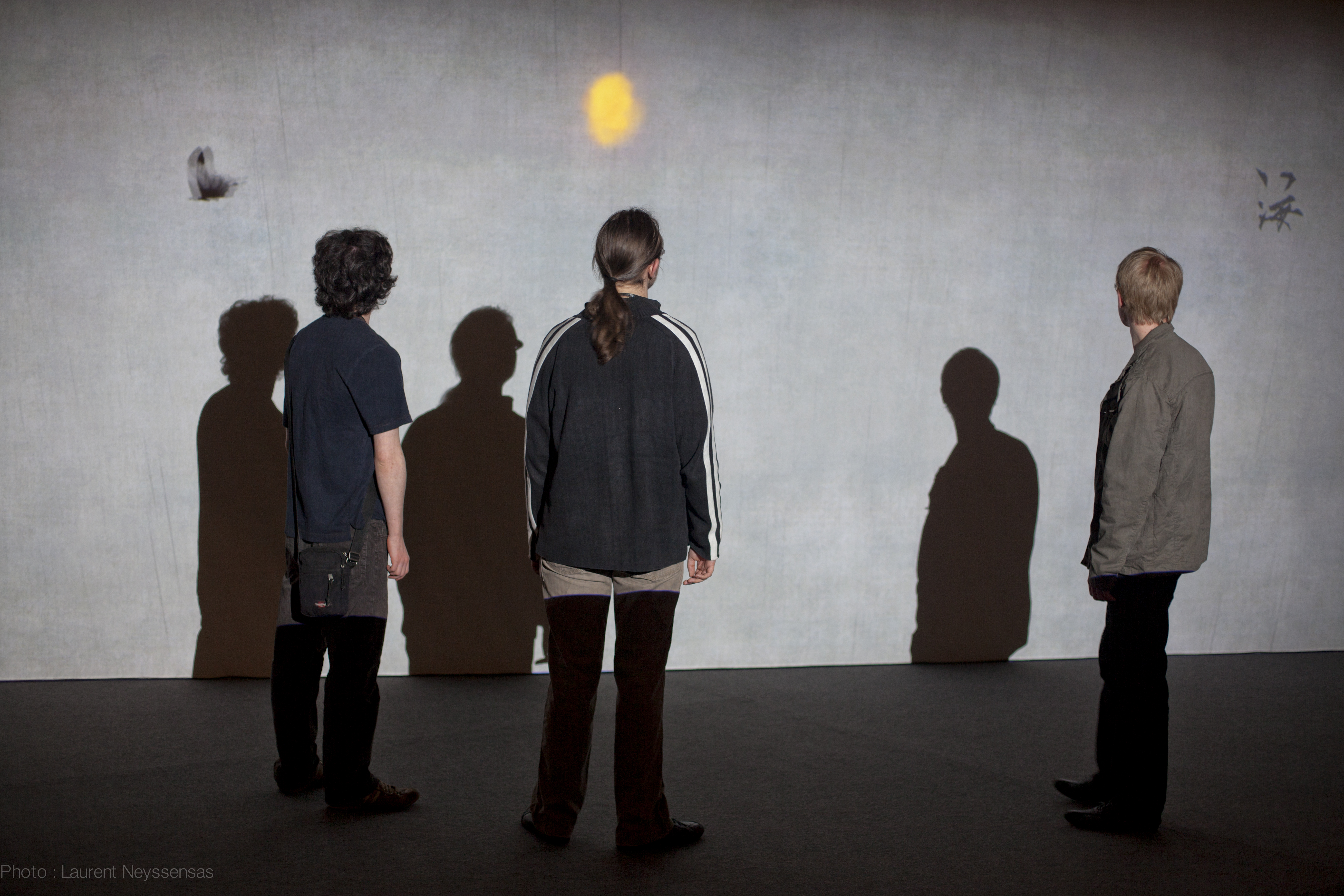 Team lab Inc (japan). Démonstration lors de Laval Virtual, Laval, Mayenne, France.